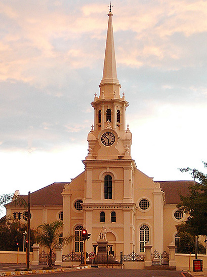 Wellington (Suid-Afrika) se moederkerk troon uit bo Kerkstraat